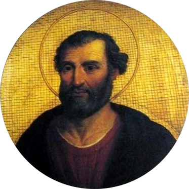 Immagine tratta da